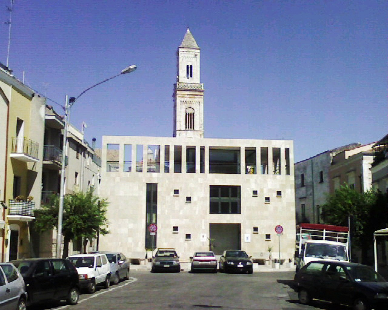 palazzo della cultura- Modugno (bari)-Italy